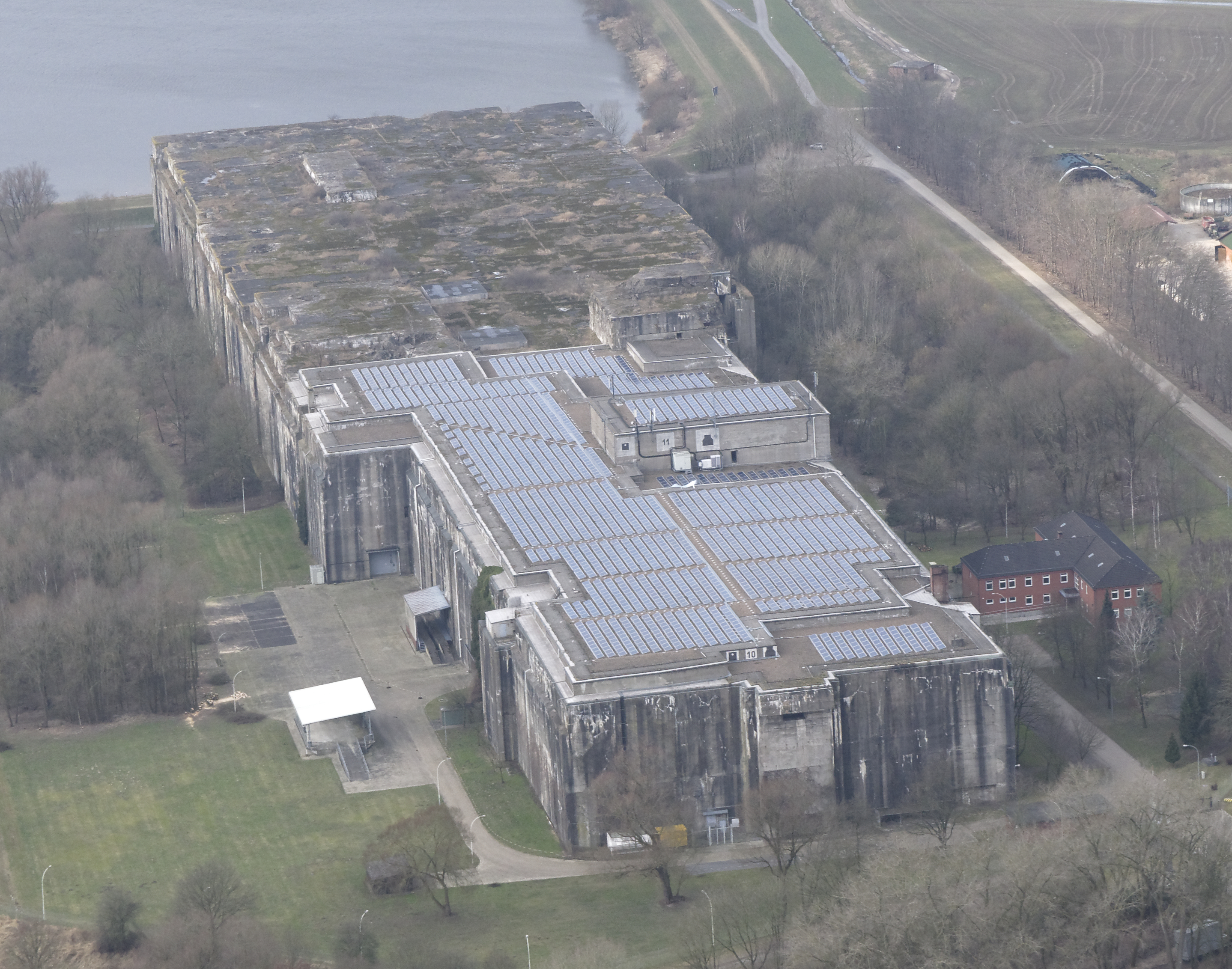 Luftaufnahme: U-Boot-Bunker Valentin